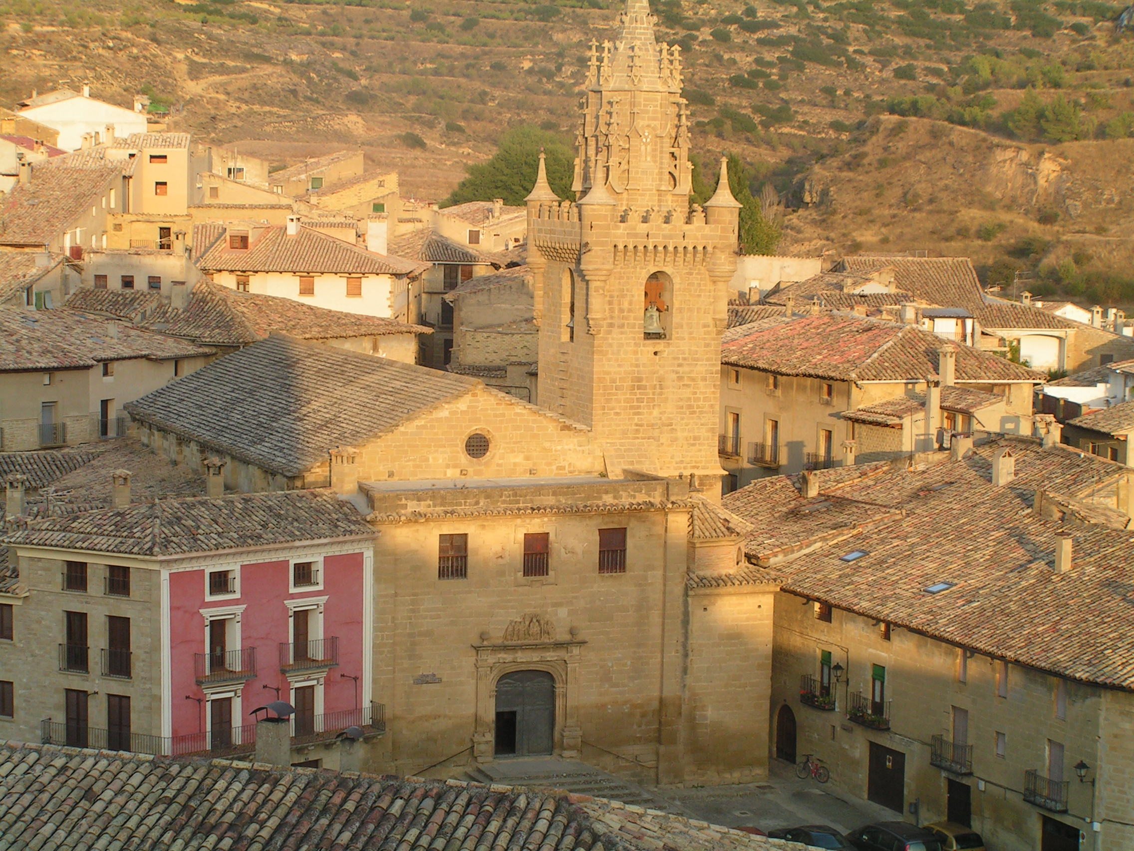 Aragonés: Ambista d'a ilesia de Santa María d'Uncastiello dende a ilesia de San Chuan d'Uncastiello (Uncastiello, Zinco Billas, Aragón).